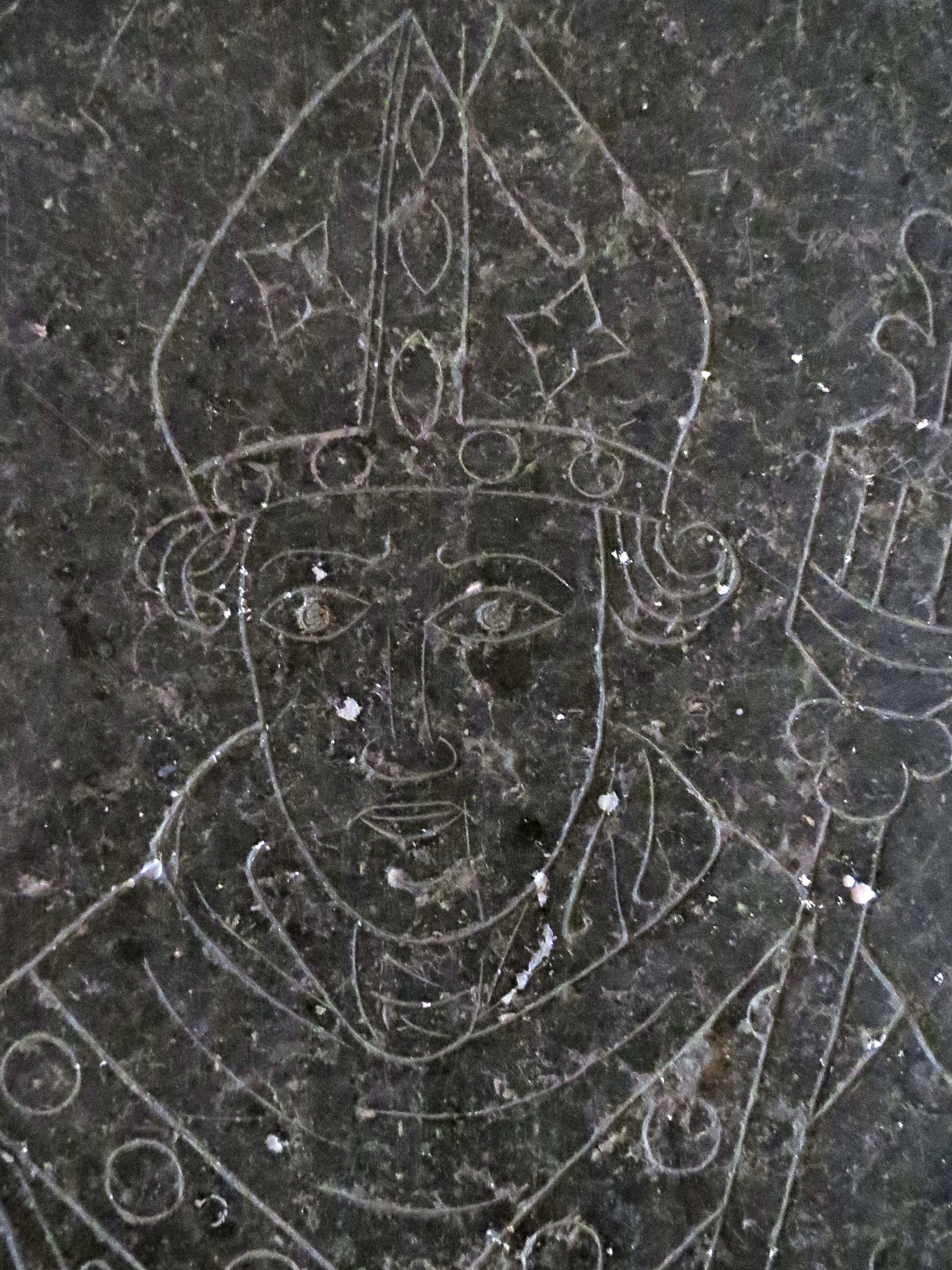 Ærkebiskop Tuve (Tue) Nielsen (-1472). Detalje fra gravsten i Lund Domkirkes krypt.